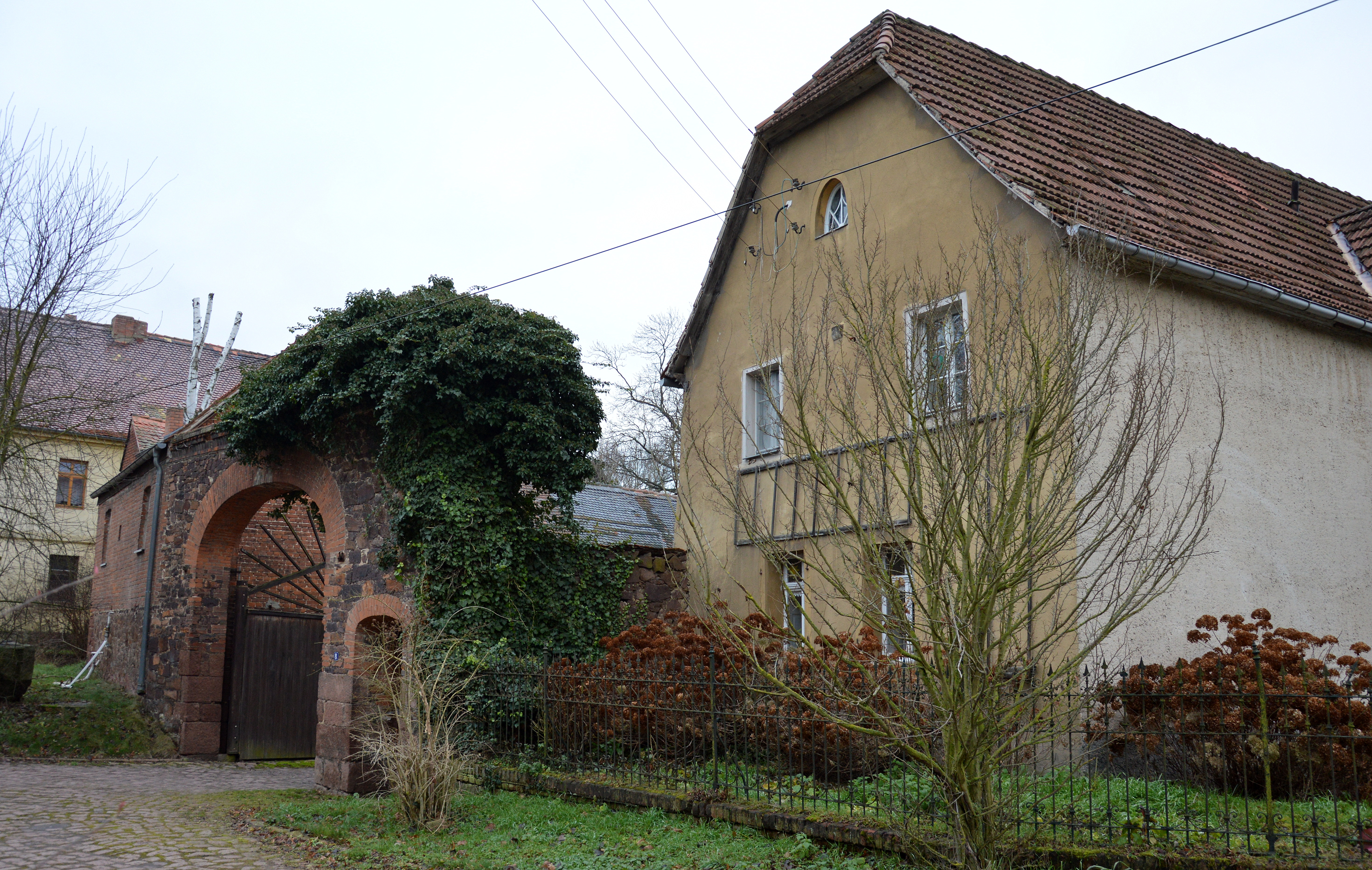 Dachritz 8